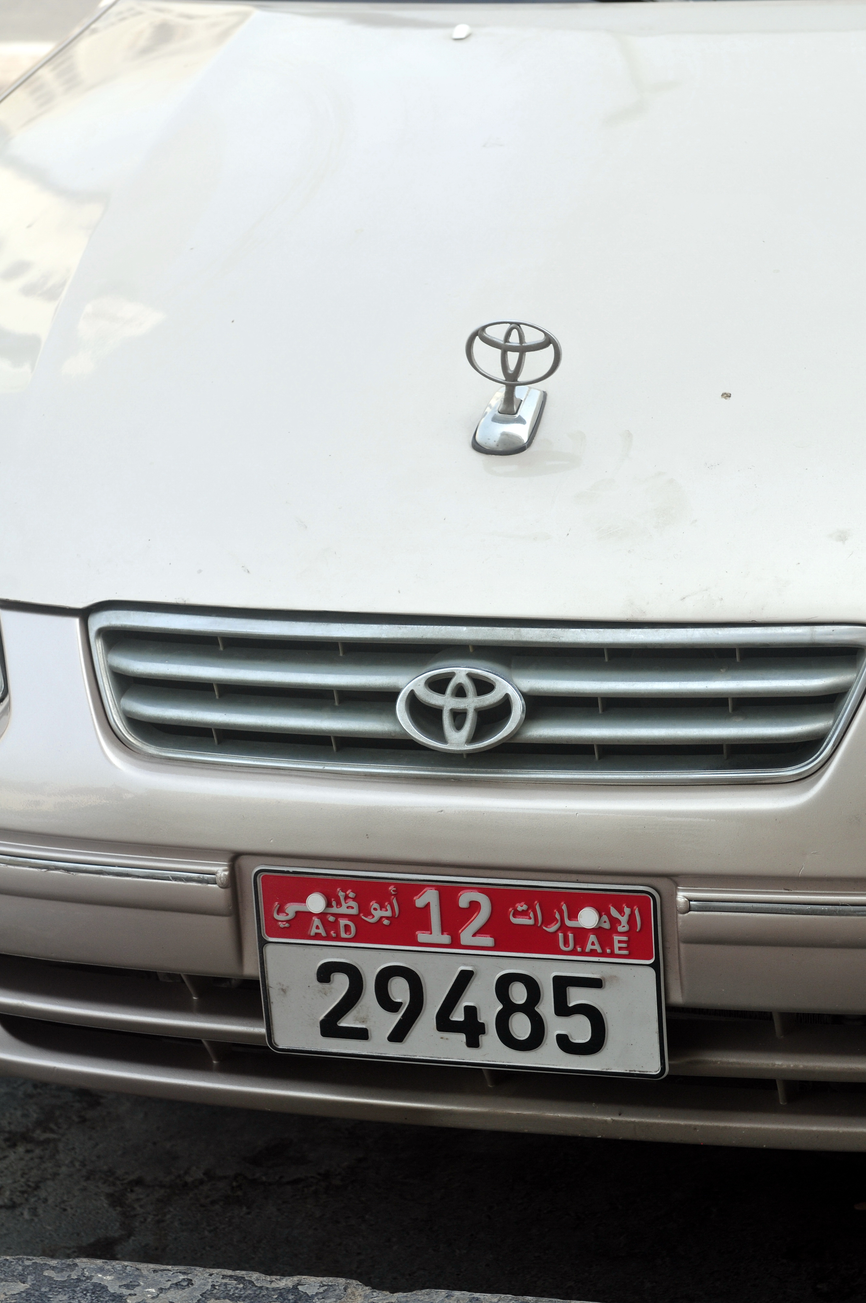 travel to Wikimania 2013: Abu Dhabi